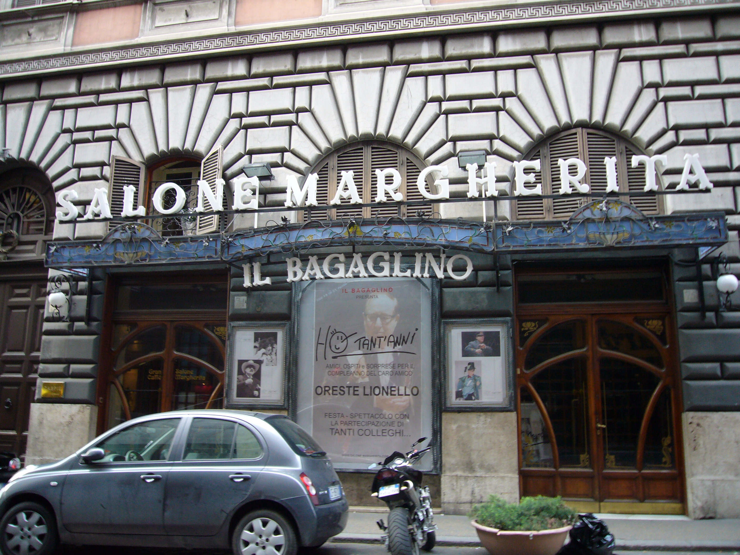 Roma, Salone Margherita a via dei Due Macelli (ora sede del Bagaglino)